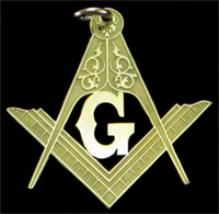 El símbolo mas usado y distintivo de los FrancMasones